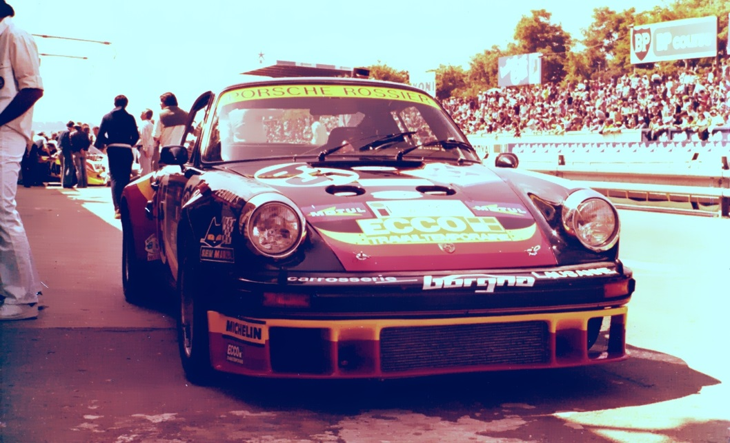 La Porsche 930 turbo d'Antoine Salamin aux 24 heures du Mans 1978